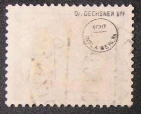 Beispiel eines falschen BPP Prüfstempels ("Dr. Oechsner")